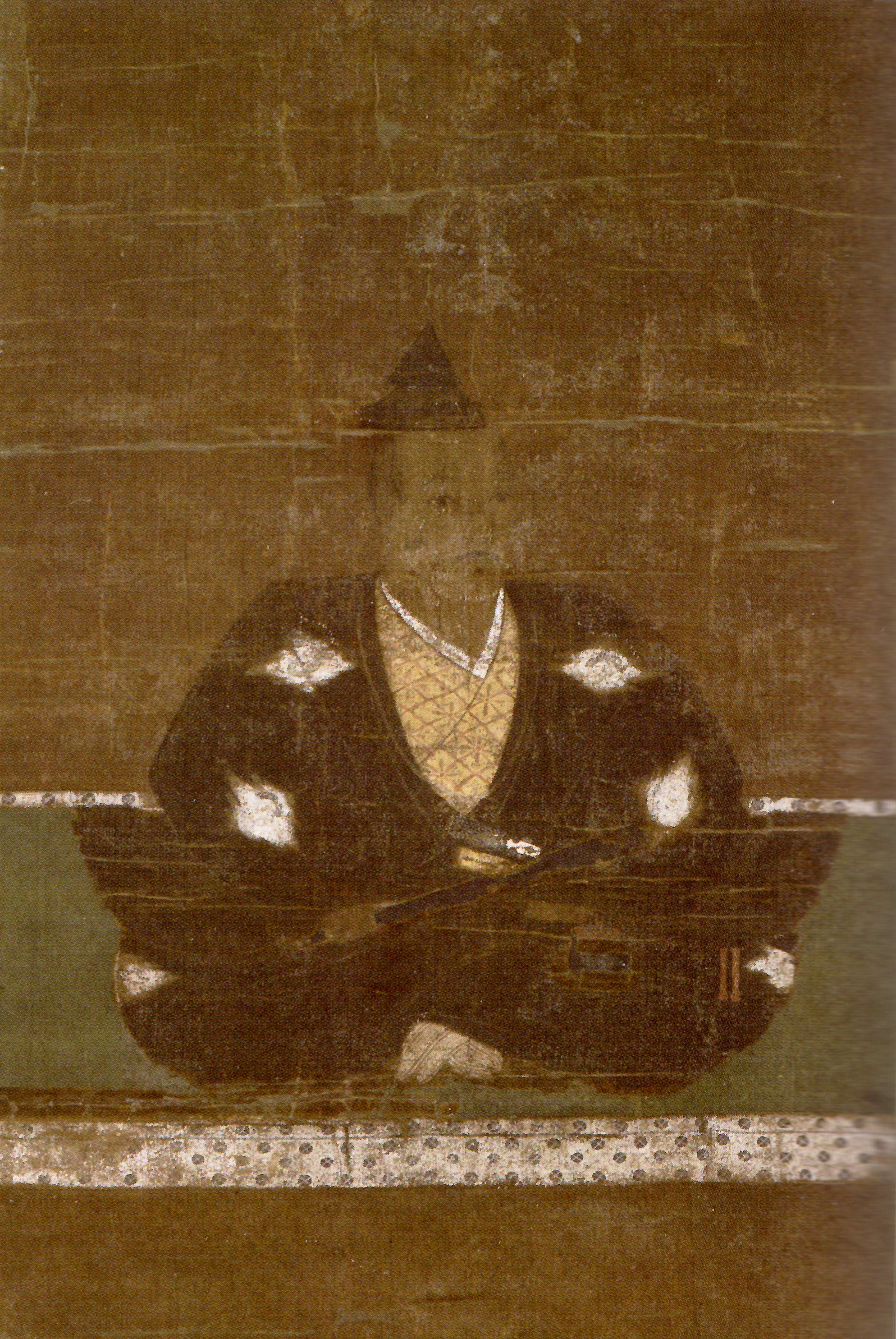 若狭武田氏・武田信高の肖像。